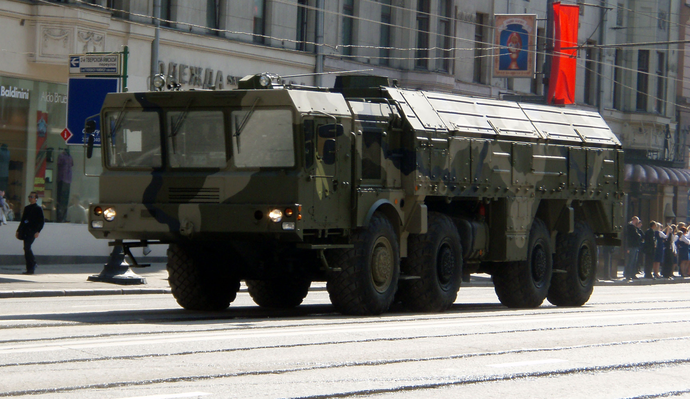 ОТРК Искандер-М на репетиции Парада Победы 2008 года